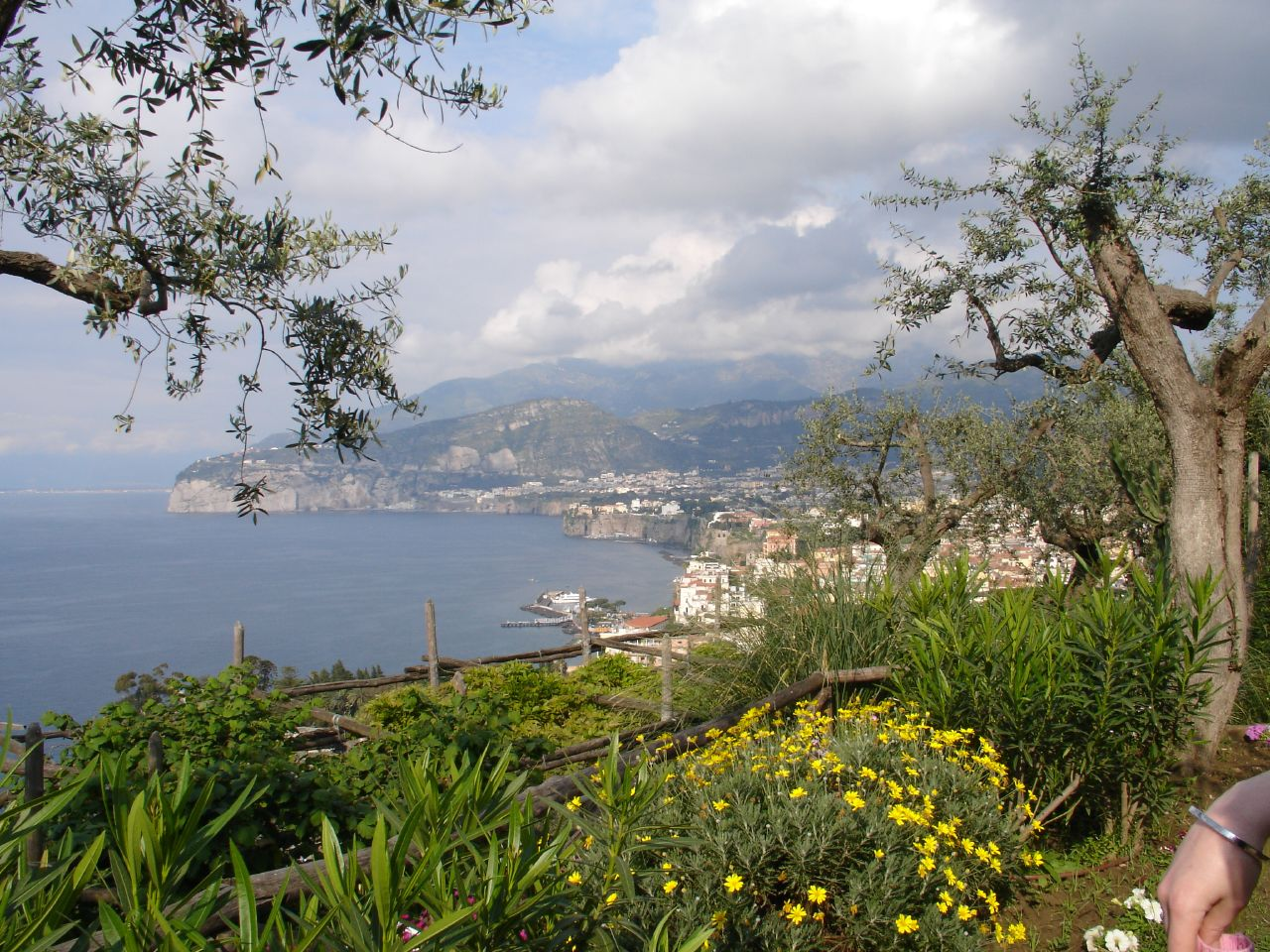 Sorrento, Campania,Italia